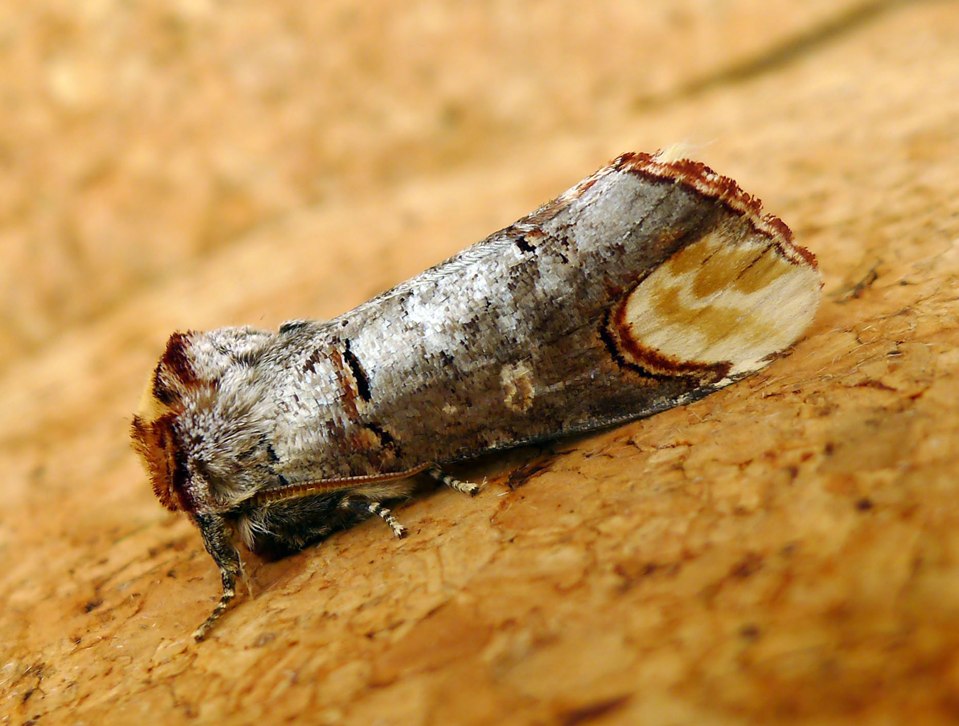 SO 7347